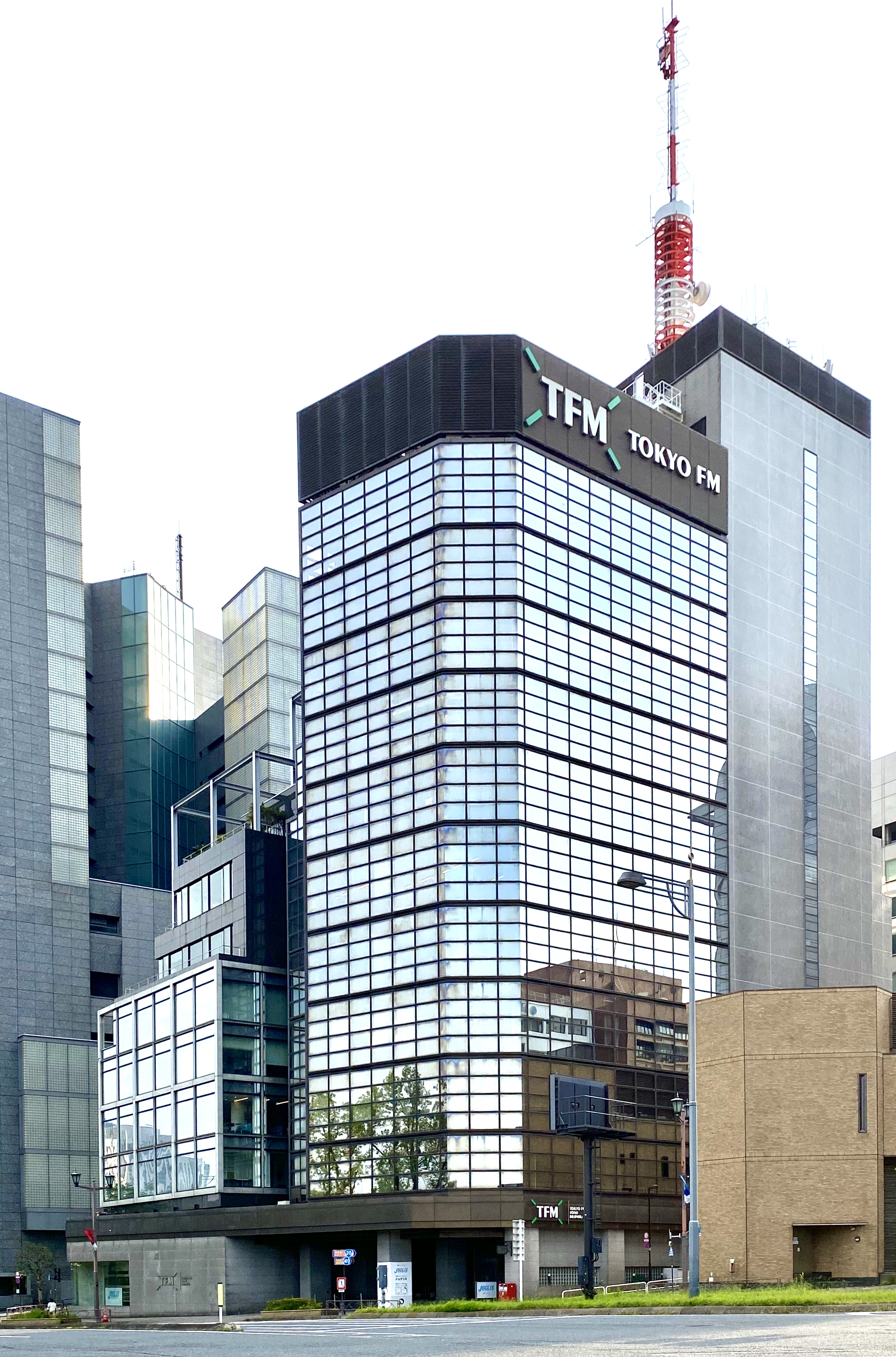 JFN本部のあるFMセンタービル（東京都千代田区麹町）